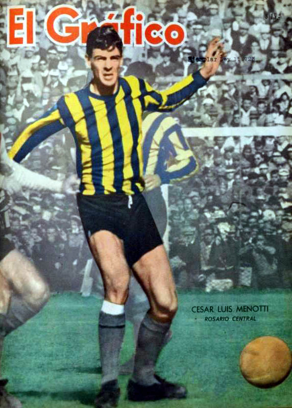 César Menotti